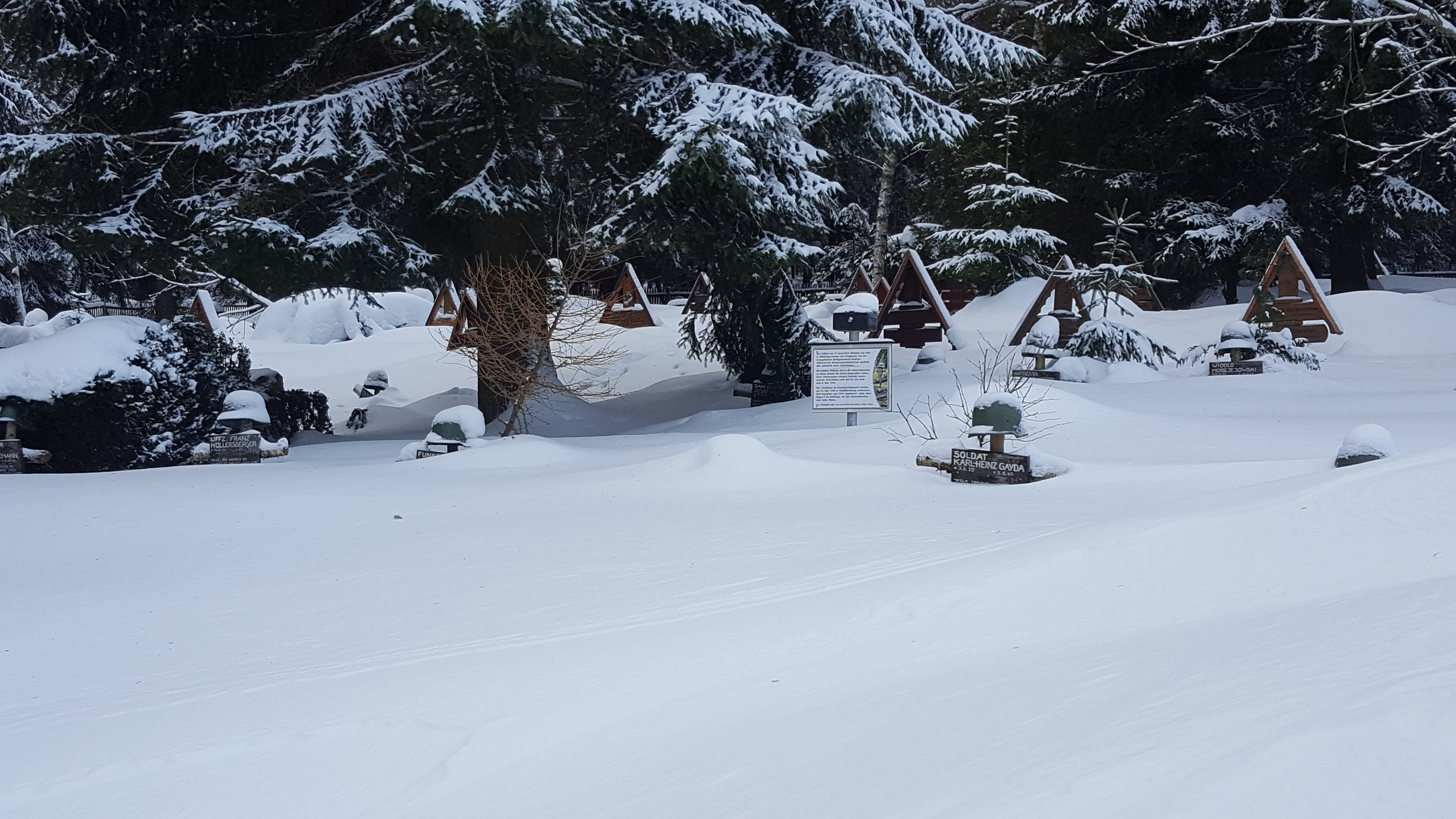 Oberbärenburg; evangelische Waldkapelle im Winter, Waldfriedhof